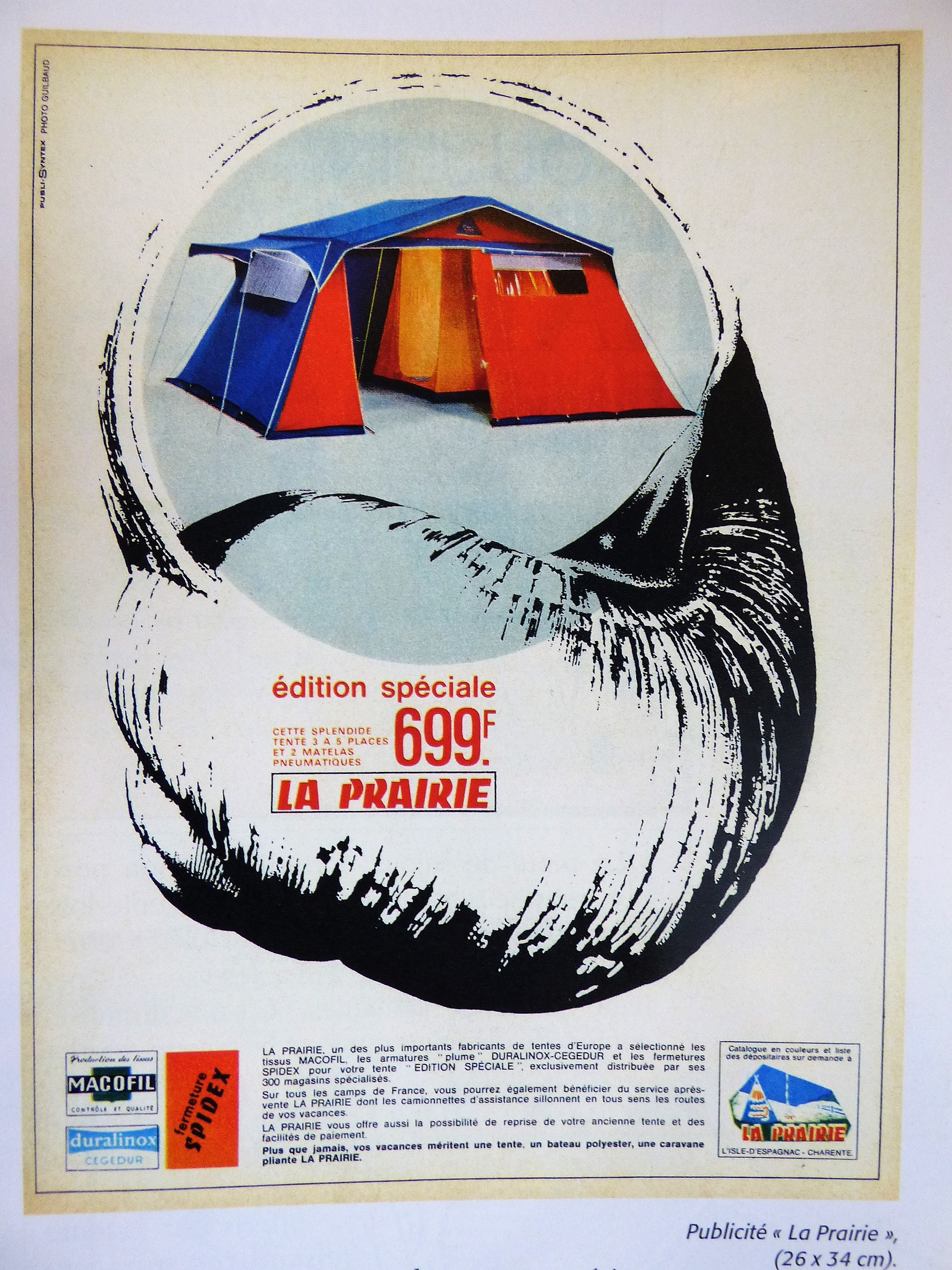 Affiche publicitaire de la société La Prairie fabricant de tentes et de bateaux de plaisance